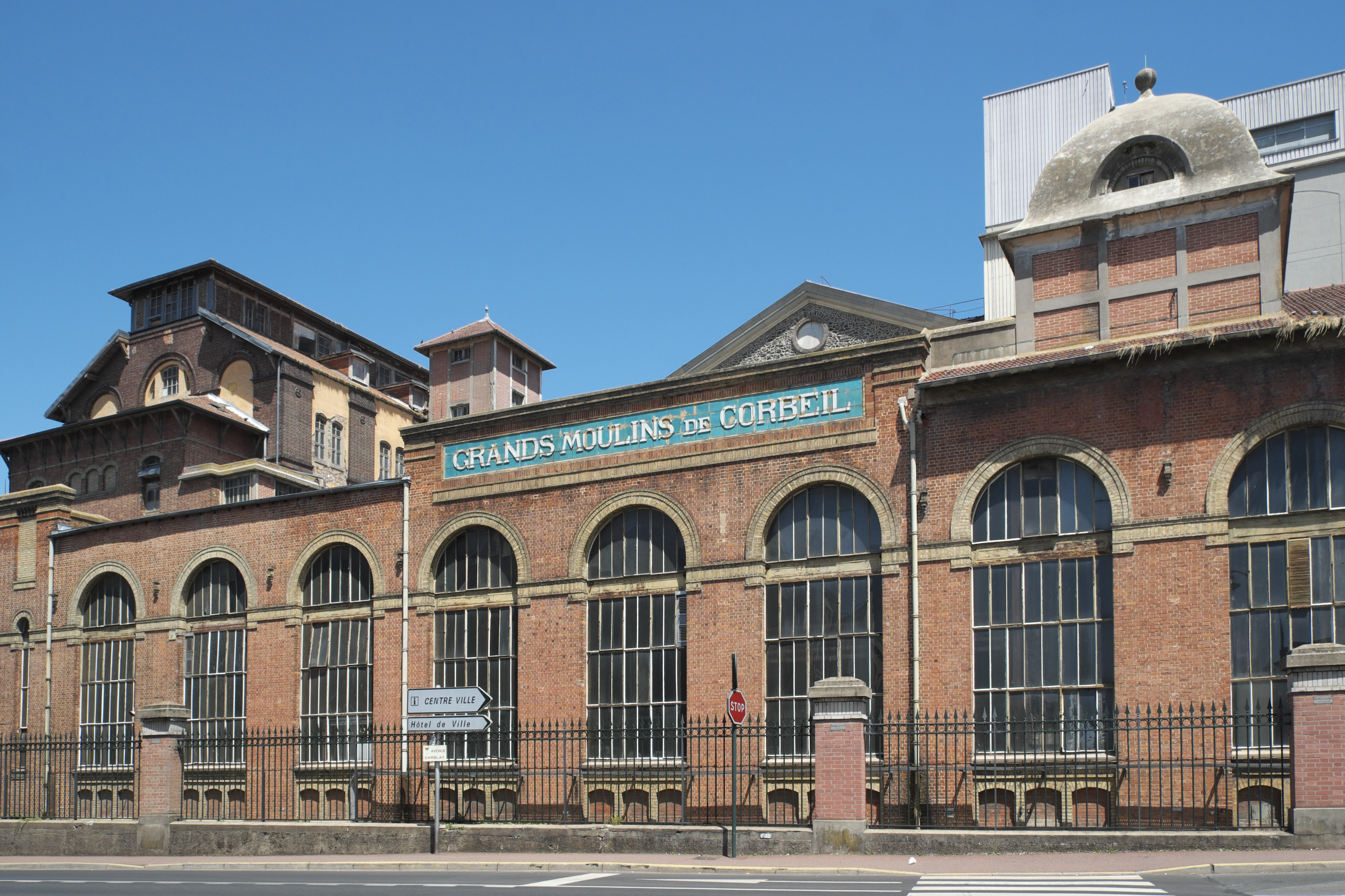 Grands moulins de Corbeil (Mühle) in Corbeil-Essonnes im Département Essonne (Region Île-de-France/Frankreich)